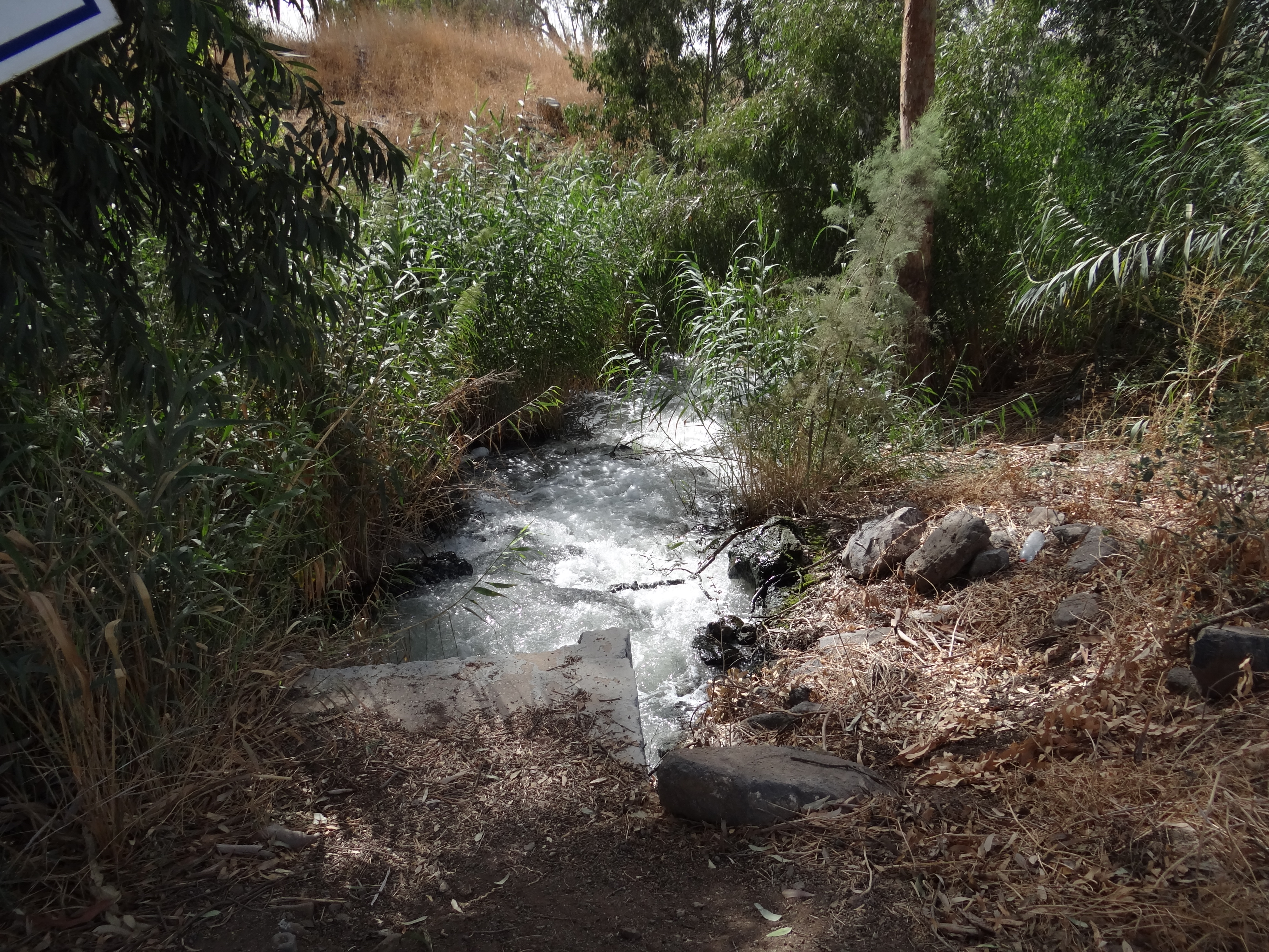 Alumot Dam on Jordan River סכר אלומות על נהר הירדן, הוא סכר עפר בירדן הדרומי מדרום לאתר ירדנית צידו הדרומי של הסכר, הירדן נעשה צר, לכאן נשפכים מי תעלת המים המלוחים